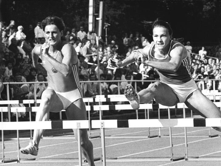 Gloria Siebert, Cornelia Oschkenat ADN-ZB Oberst 8.9.88 Potsdam: DVfL-Sportfest - Den 100-m-Hürdenlauf gewann Gloria Siebert (SC Cottbus) in 12,67 s vor Cornelia Oschkenat (SC Dynamo Berlin, l.).